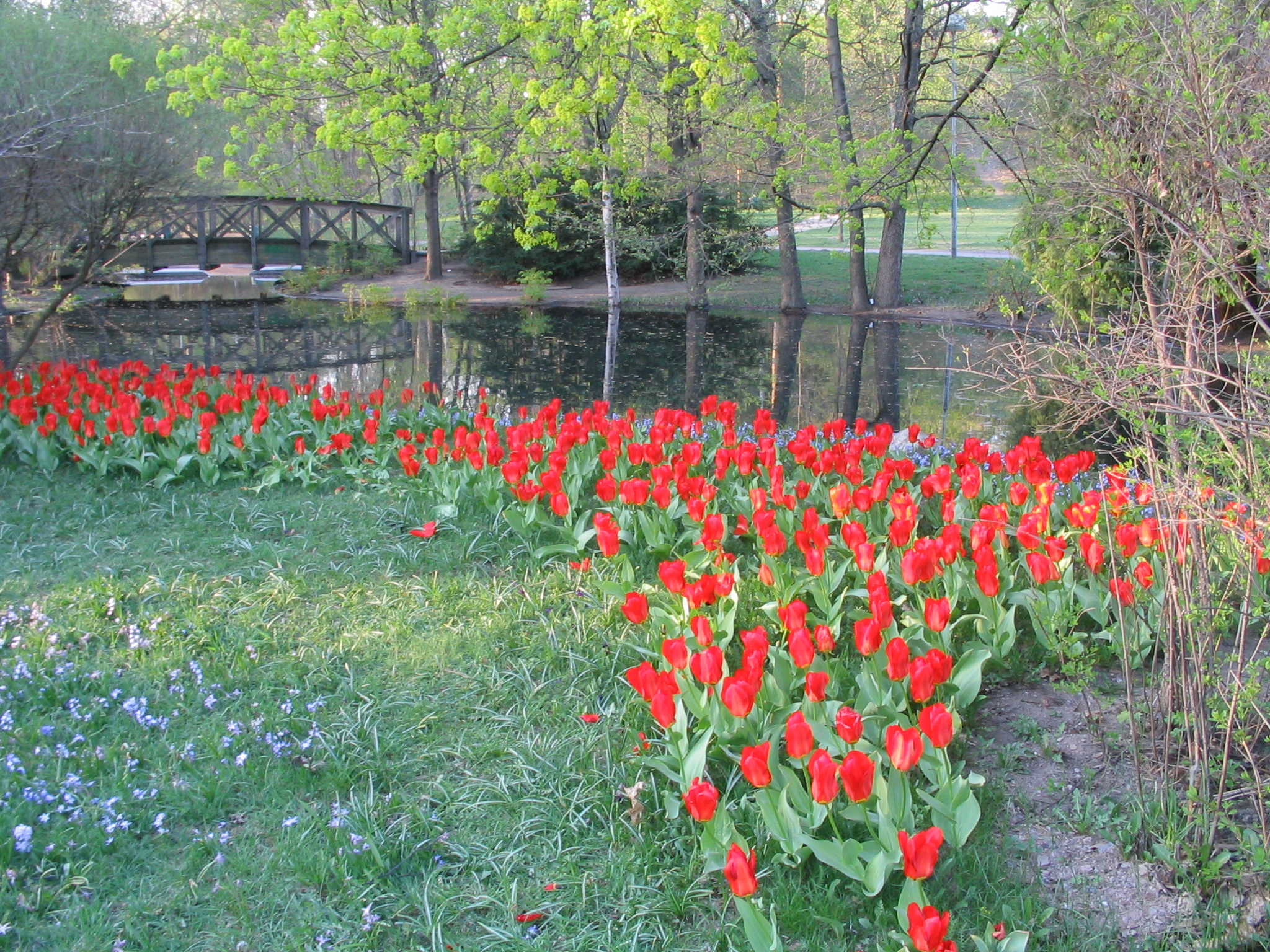 Alppipuiston istutuksia